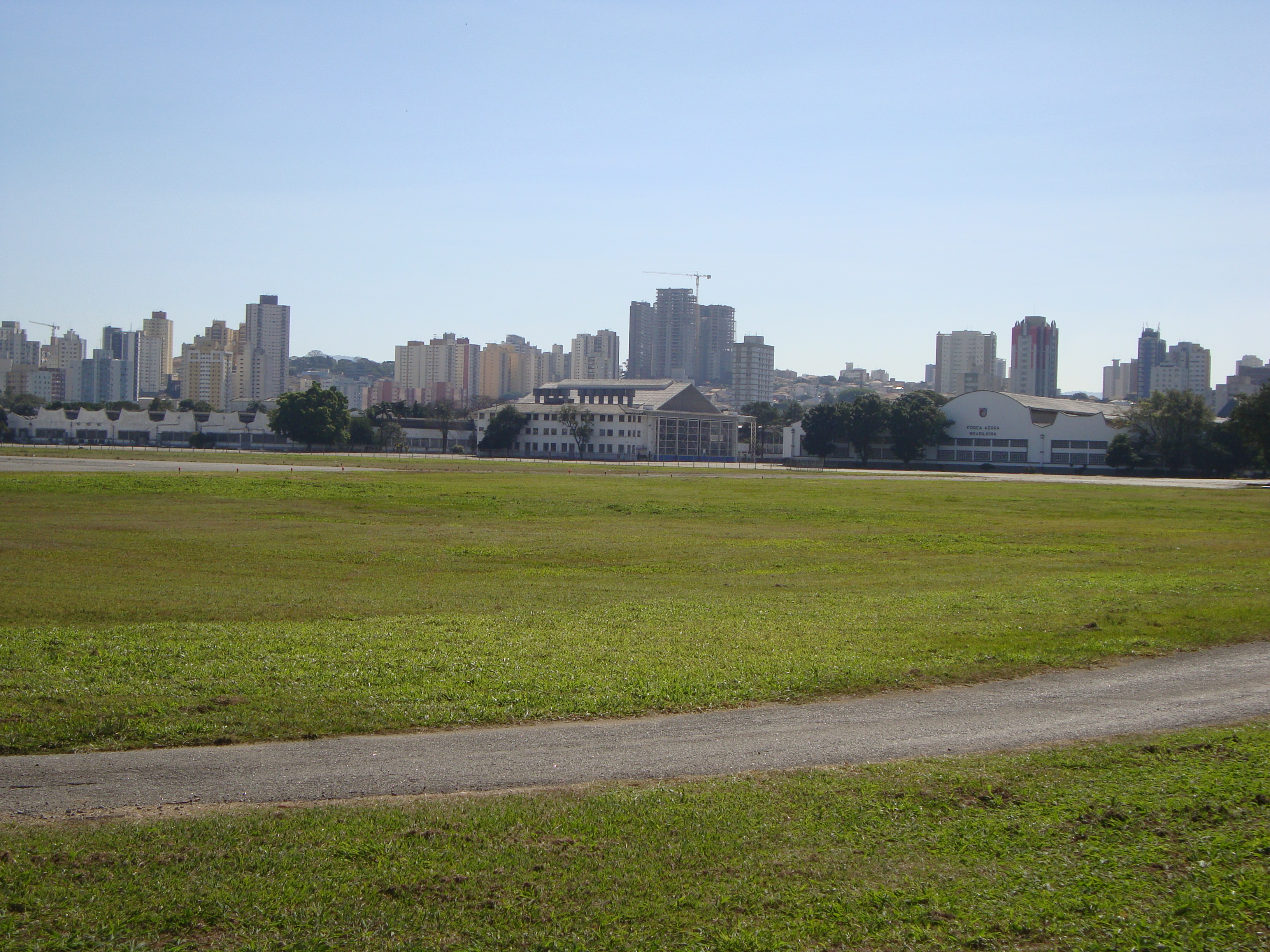 Aeroporto Campo de Marte, distrito de Santana Zona Norte paulistana. Brasil